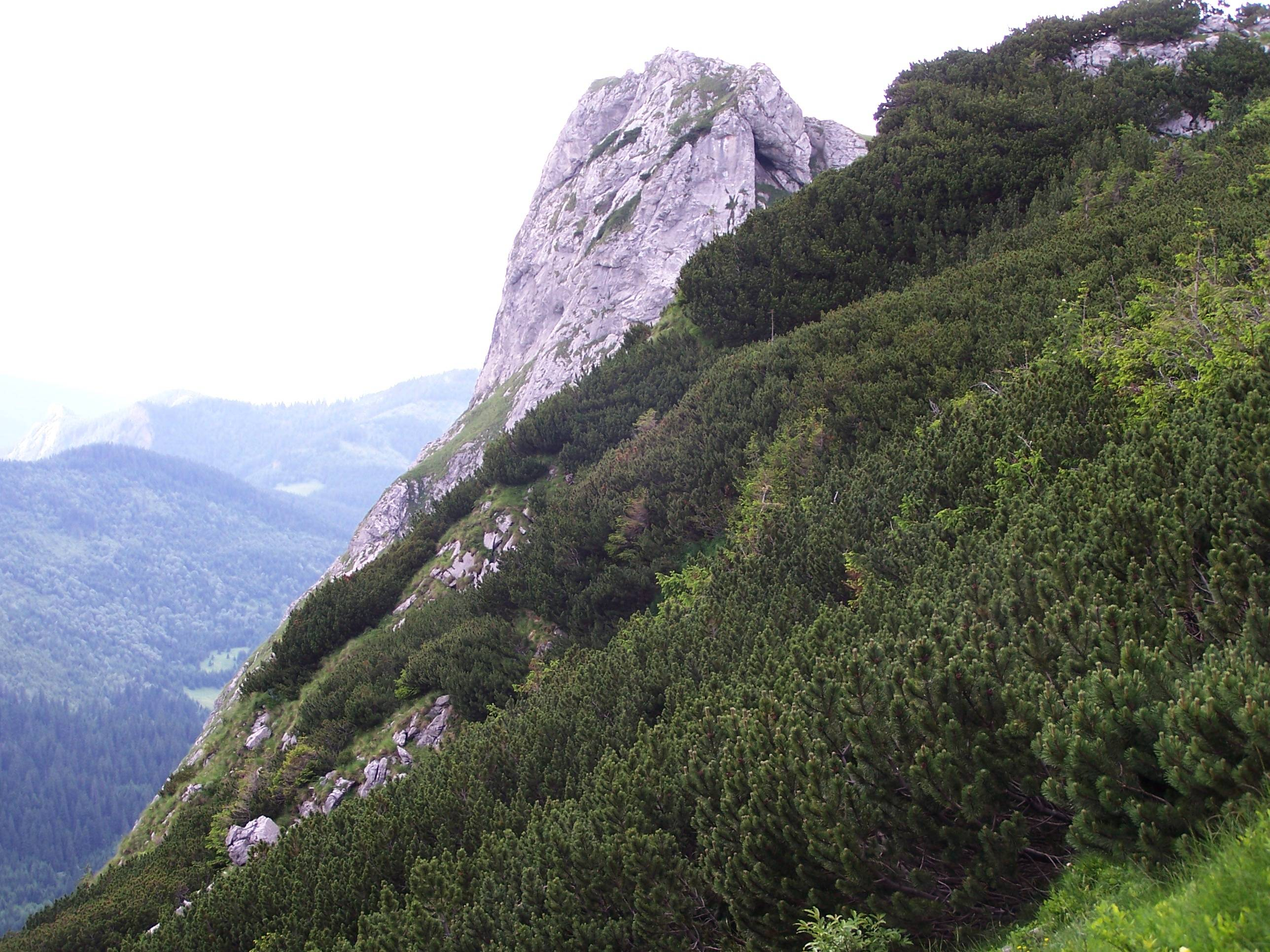 Siodłowa Turnia (Tatra Mountains, Dolina Małej Łąki).